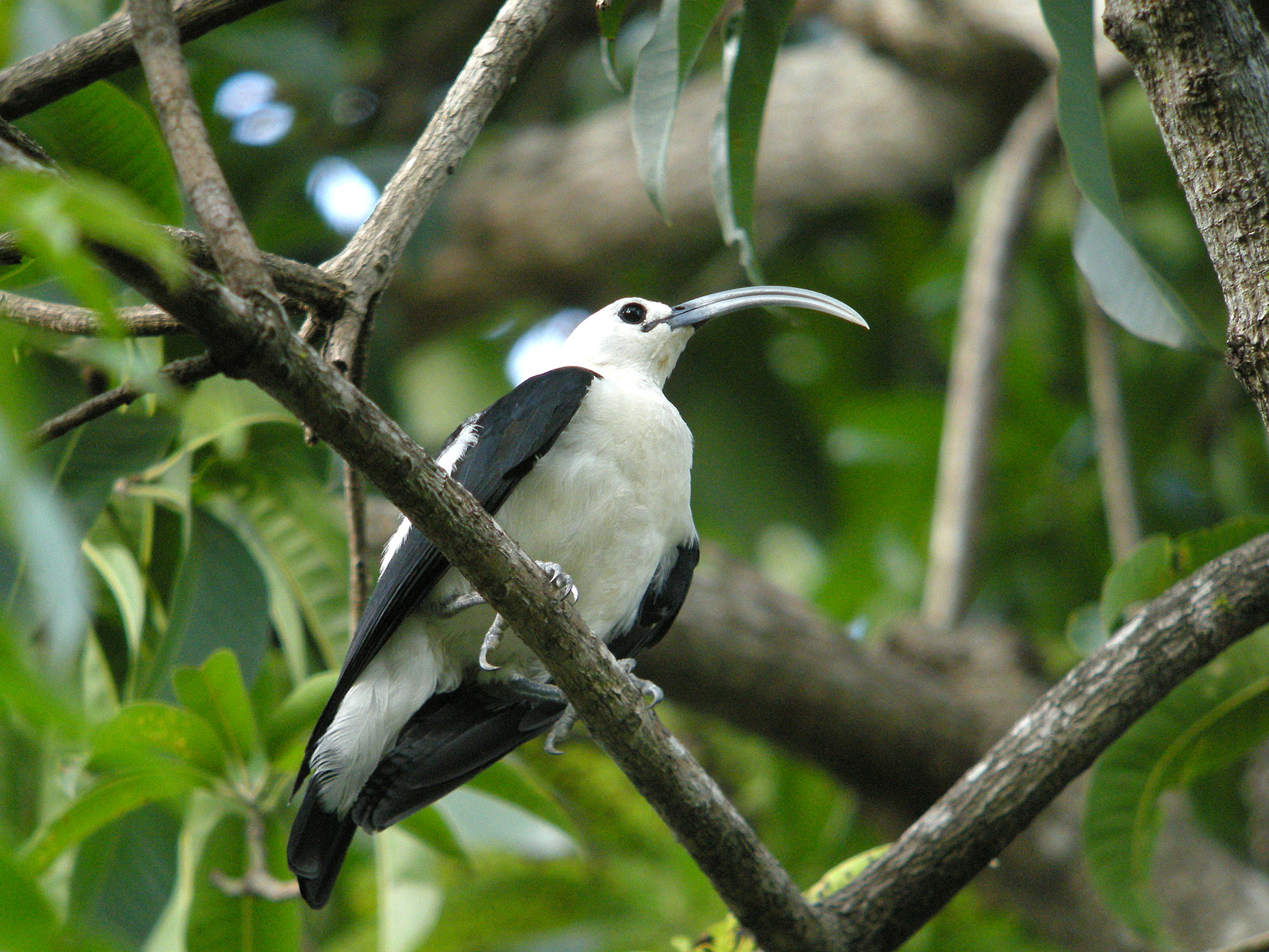 Sickle-billed Vanga (Falculea palliata), Ankarafantsika National Park, Madagascar Swarowski 80 HD 30 X, Coolpix P5100 (Adapter DCB)